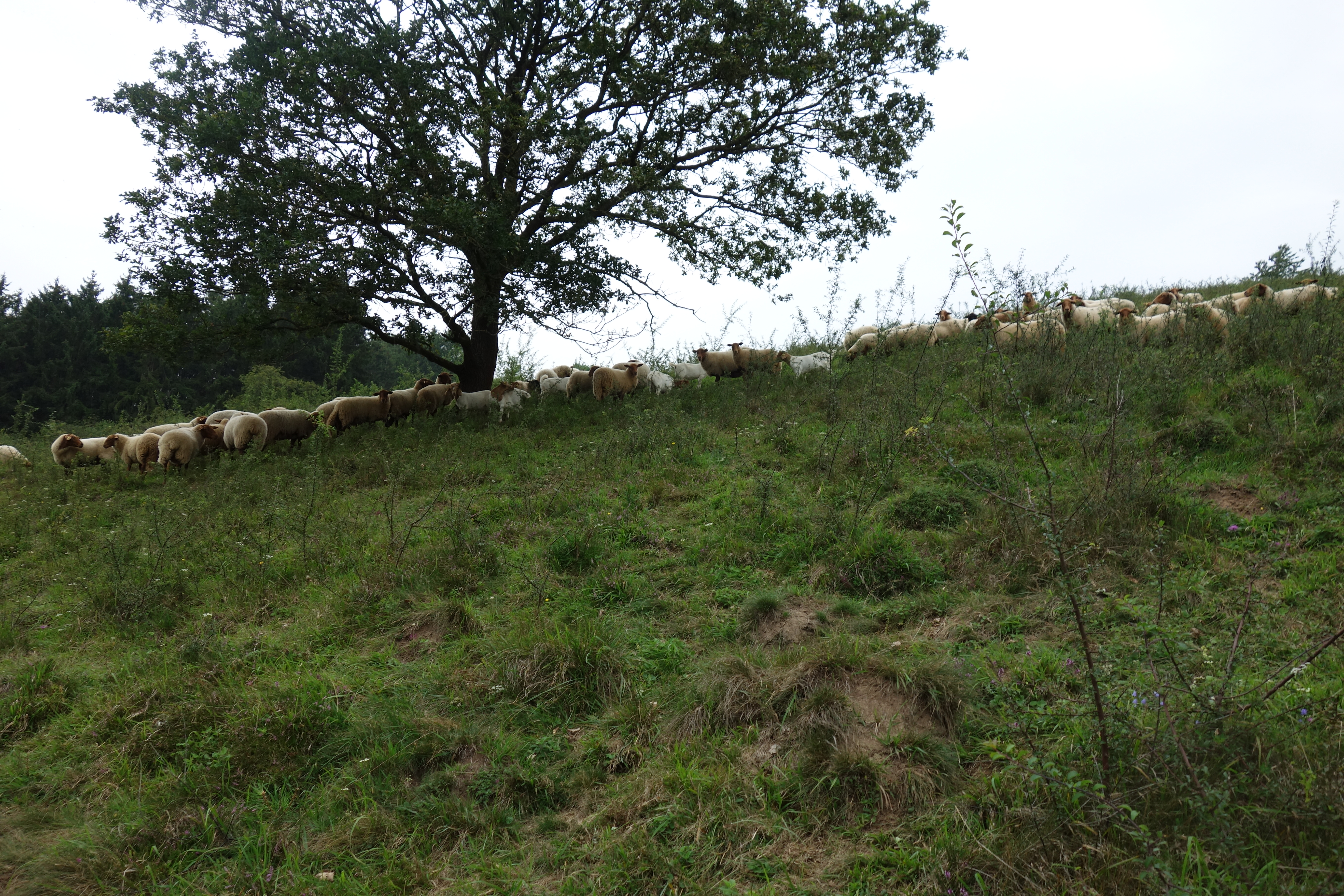 Naturschutzgebiet Wulsenberg; mittlerer Bereich mit Schafen.